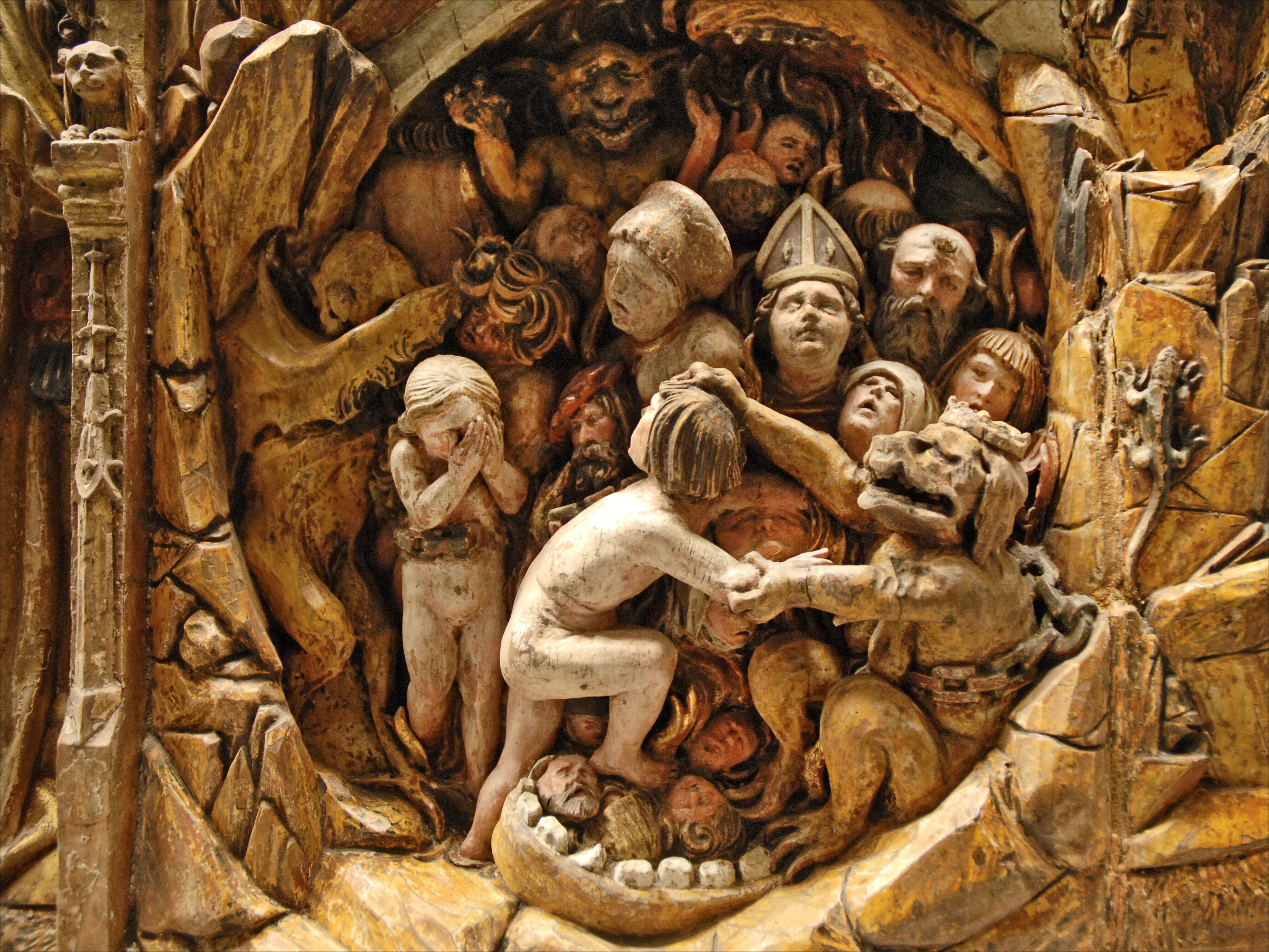 Biberach (Souabe) vers 1520 Le Jugement dernier Détail de la partie représentant l'Enfer Bois de tilleul Site du musée